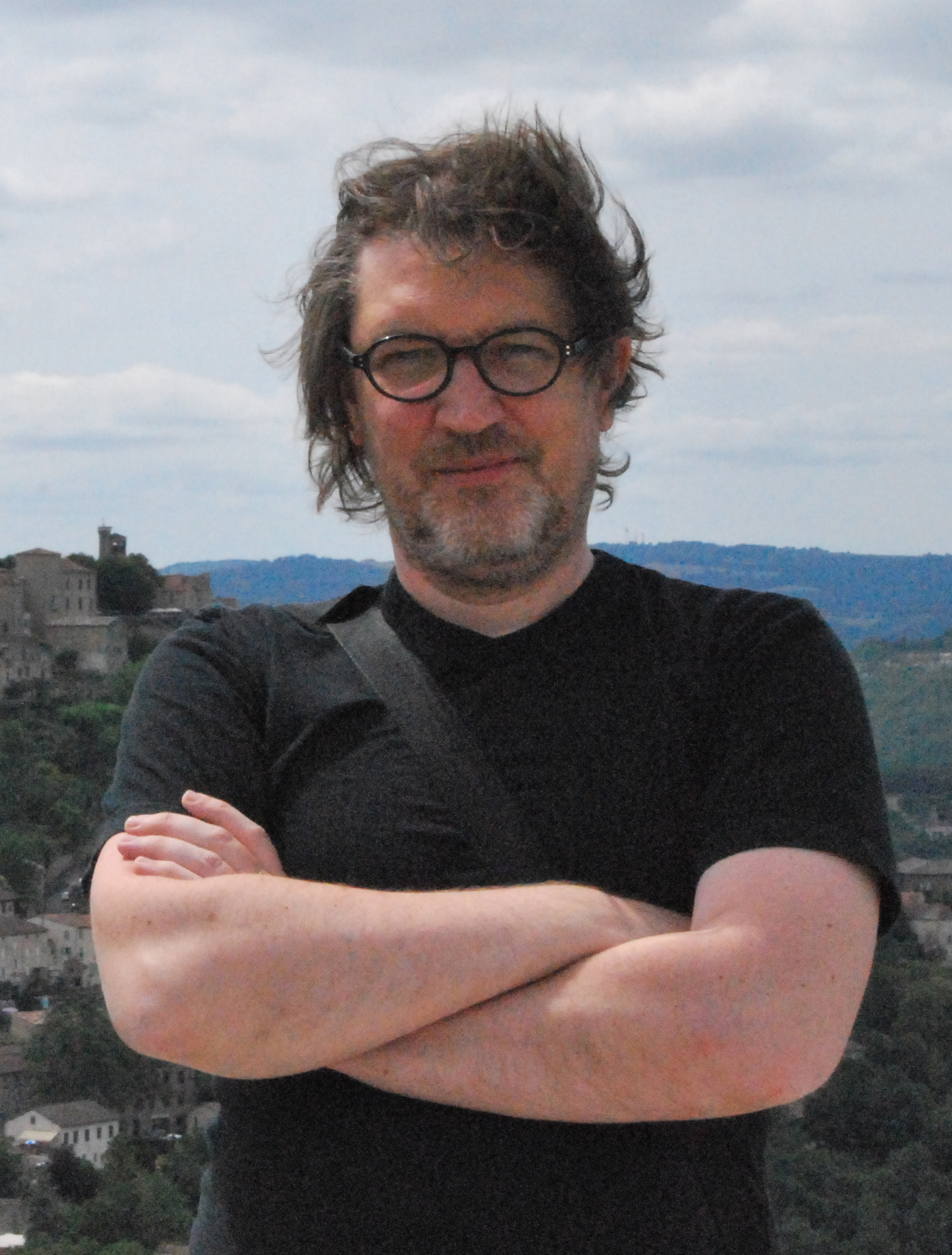 Benoit Feroumont photographié près de Cordes sur ciel.